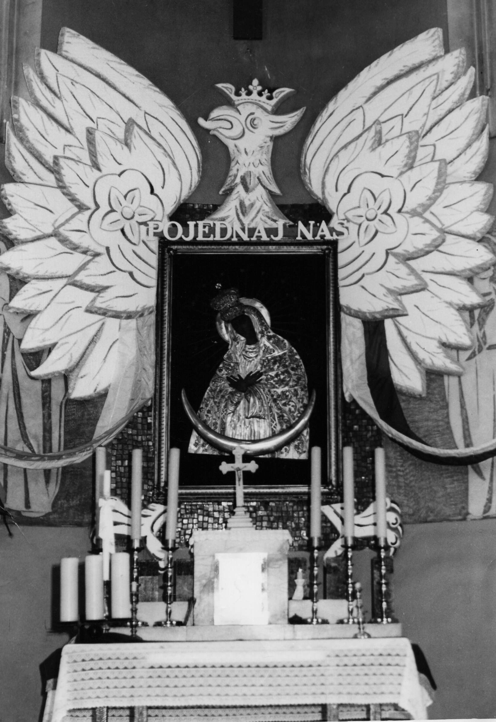 Ołtarz główny z obrazem MB Ostrobramskiej przed odnowieniem w kościele MB Ostrobramskiej w Chrzanowie